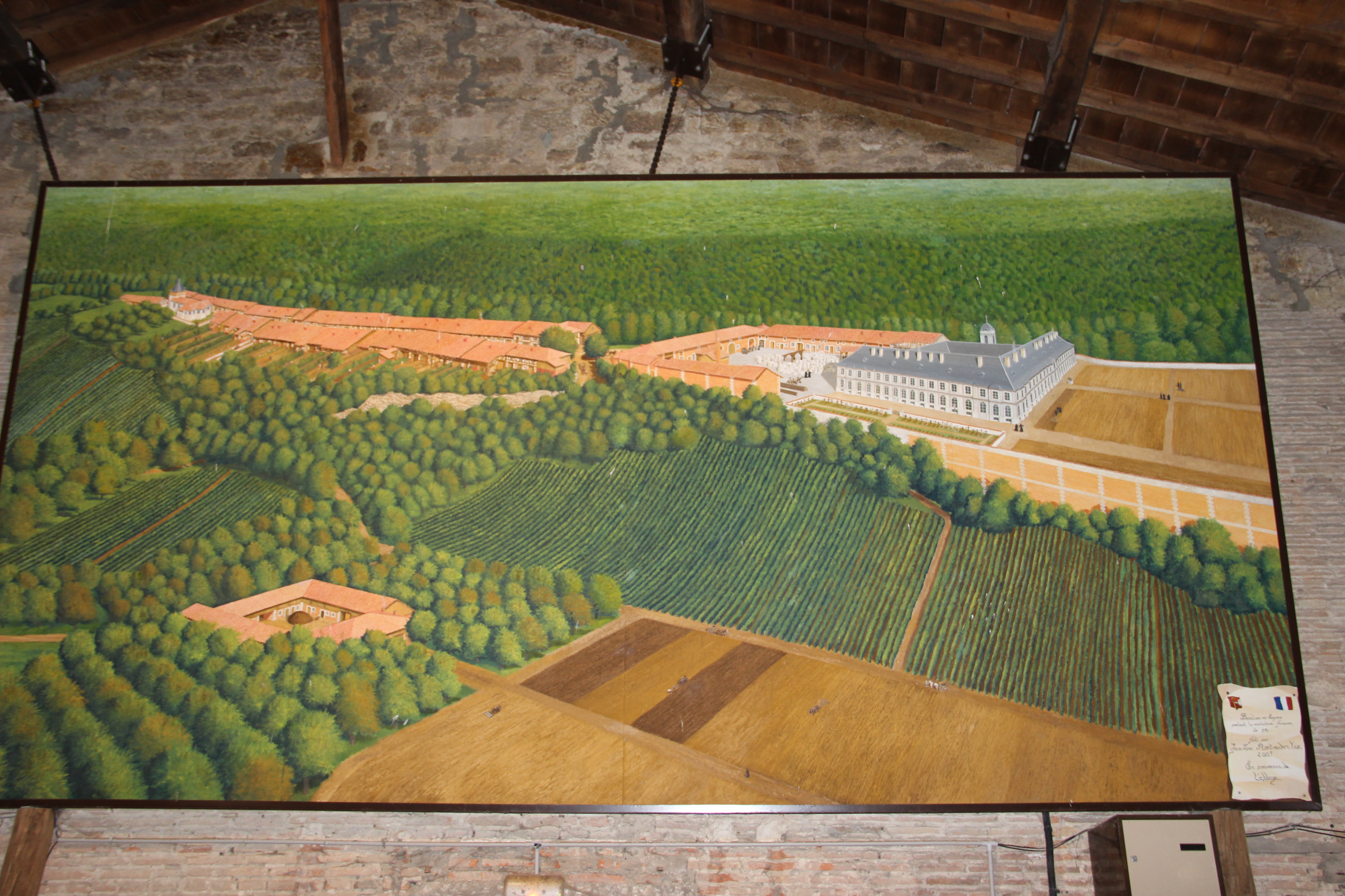 Reconstitution du village de Beaulieu et de son abbaye avant la Révolution Française.